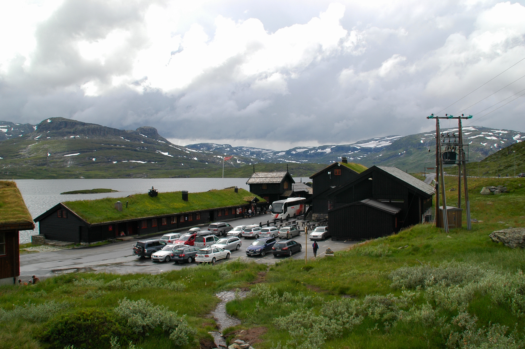 Start der Wanderung sollte genau wie vor 15 Jahren Haukeliseter sein, eine Raststätte mitten auf dem Fjell. Von hier verlässt der Pfad die Straße nordwärts. Für acht Tage das letzte Mal, dass ich Autos, Asphalt oder Strommasten sah.